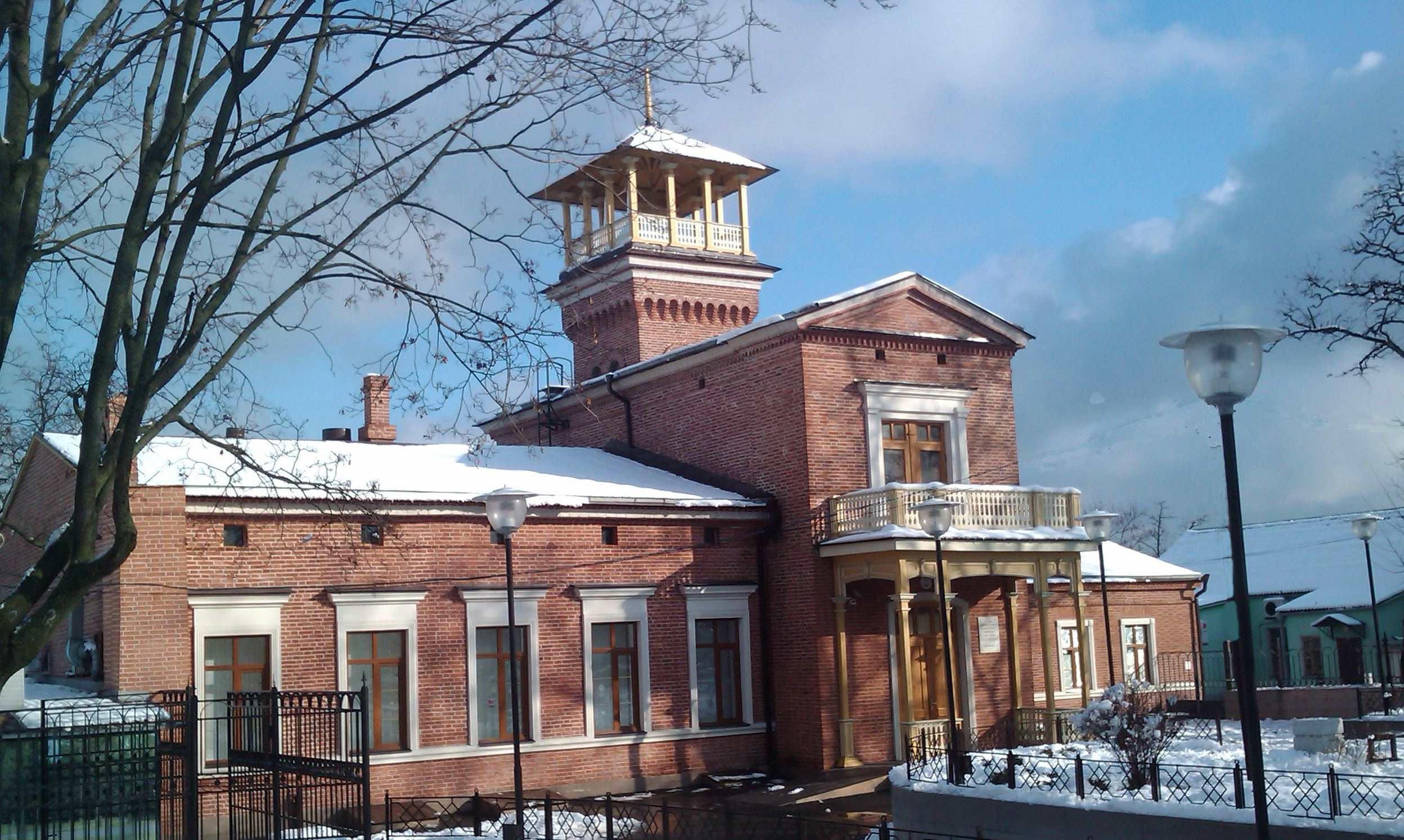 Дом Чайковского, Таганрог